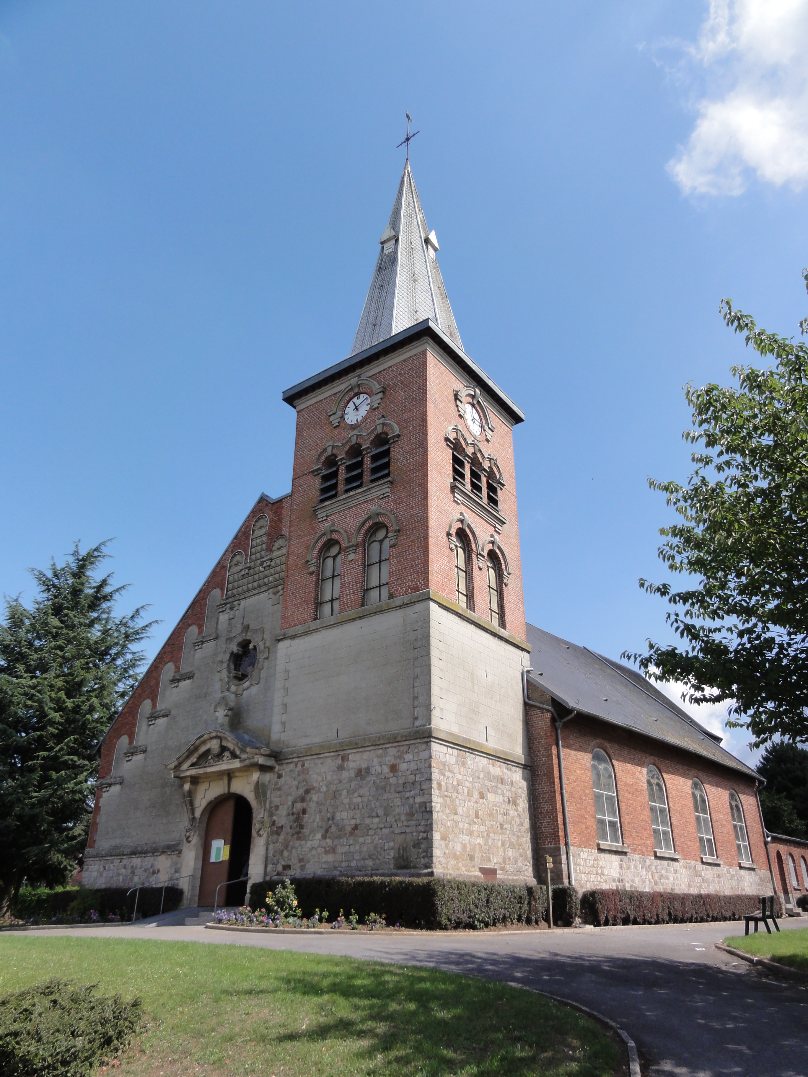 Englefontaine (Nord, Fr) église Saint-Georges, extérieur